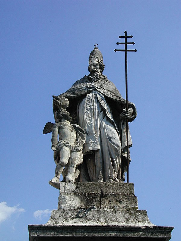 Statue von Papst Silvester I. an der Via Matteotti 1 in Mantova Source: photo uploaded by User:RicciSpeziari. Photographer: Riccardo Speziari